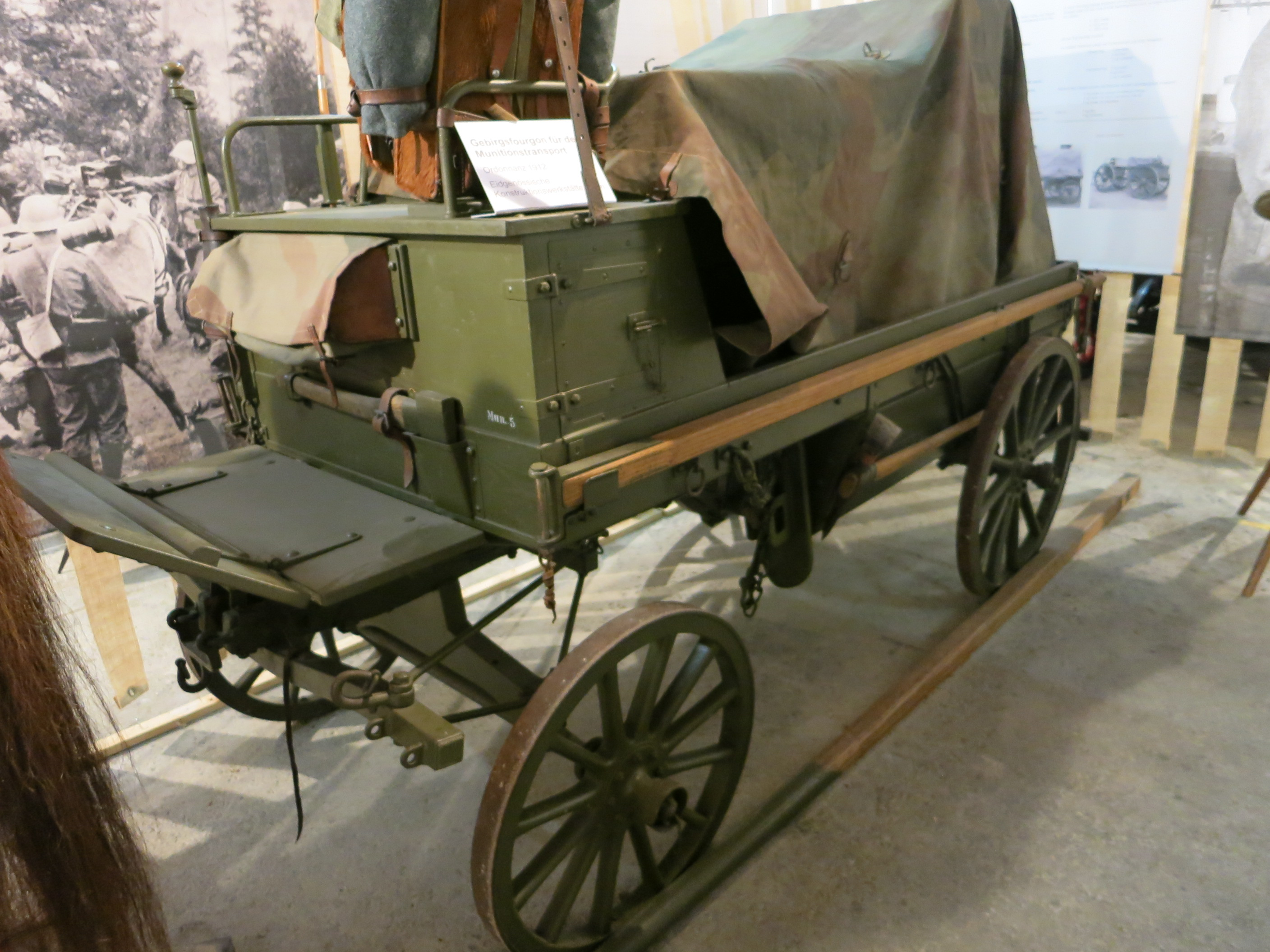 Museum im Zeughaus, Schaffhausen SH, Schweiz